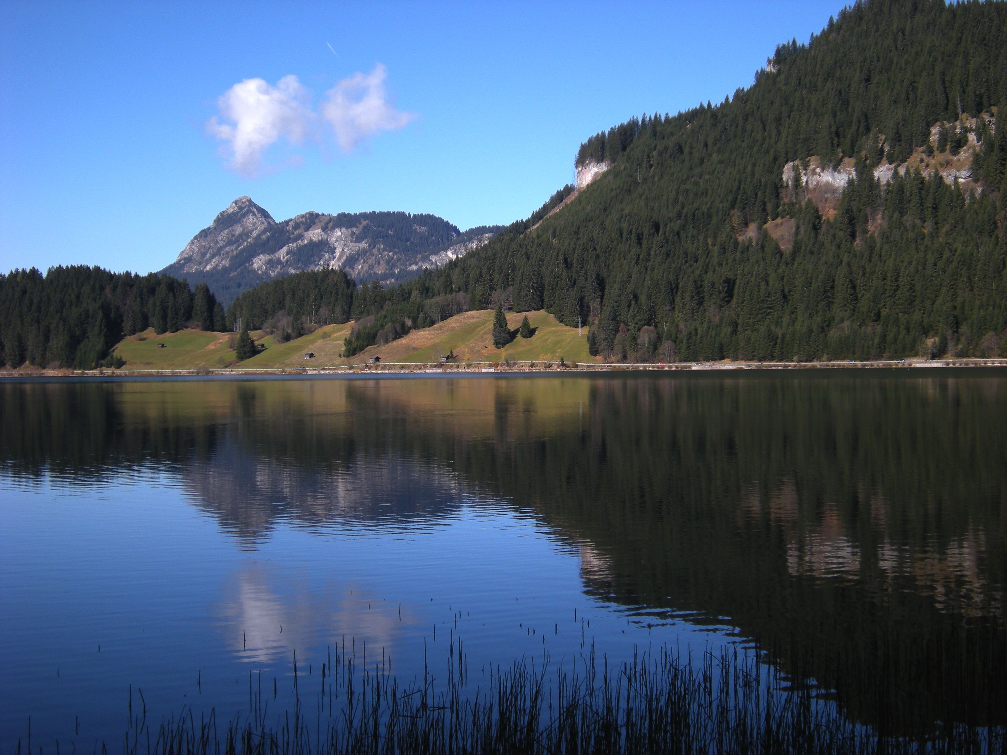 Haldensee mit Einstein im Tannheimer Tal